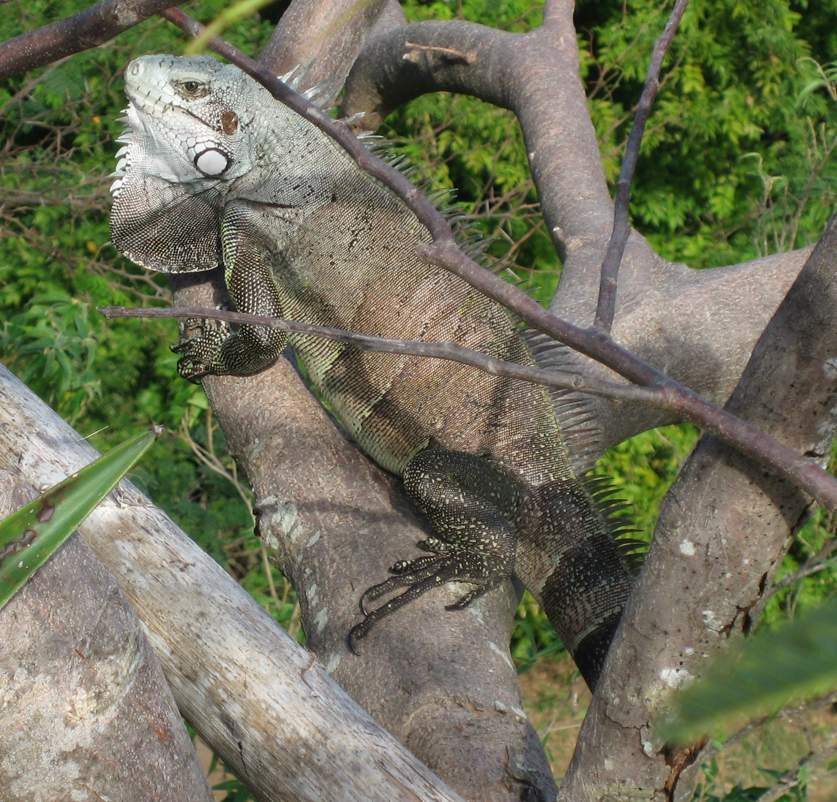 Iguana iguana au Fort Napoléon en Guadeloupe, îlet Terre de haut-de-haut l'archipel Saintes